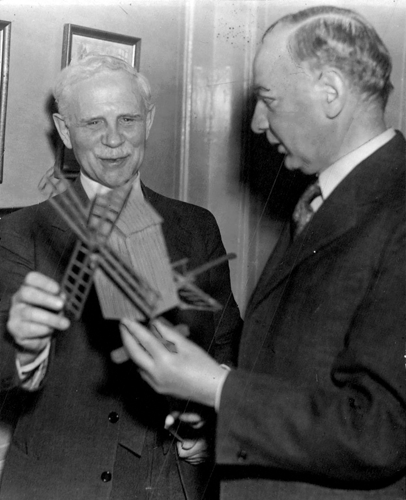 Kanslirådet A. Lekander (till vänster) och doktor Manne Hofrén med en modell av en öländsk väderkvarn.Ölandsklubben i Stockholm hade på tisdag kväll höstsammanträde på Rosenbad. Styrelsen omvaldes med kanslirådet Axel Lekander som ordförande. Efter den traditionella kroppkaksmiddagen höll museiintendenten Manne Hofrén, Kalmar, föredrag om Öland i konsten. Han skildrade med hjälp av skioptikonbilder hur starkt Öland blivit föremål för de svenska konstnärernas intresse och hur allmänheten fått upp ögonen för Ölands och särskilt Alvarets säregna skönhet.